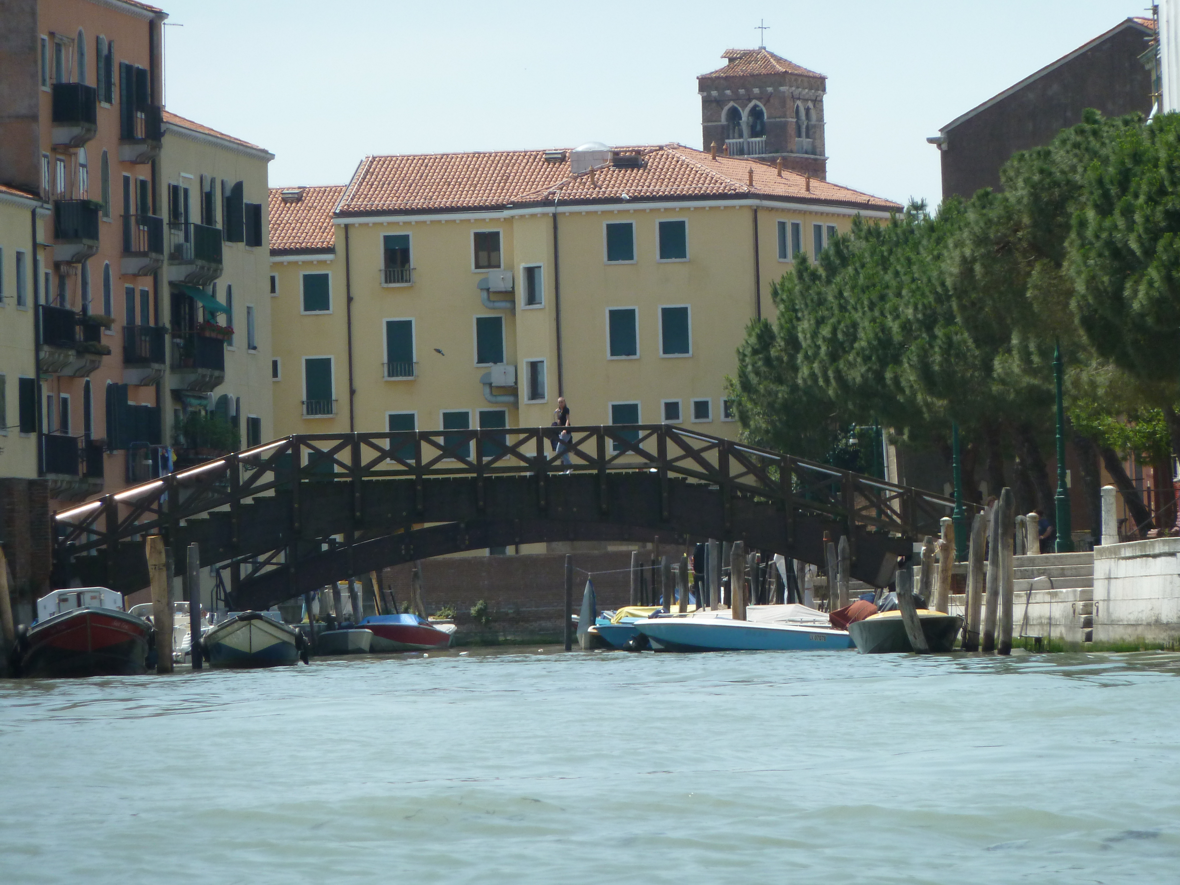 Ponte Moro - San Girolamo (Venice)